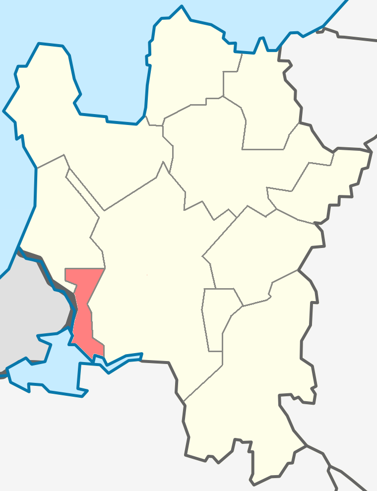 Ивангородское городское поселение на карте Кингисеппского района